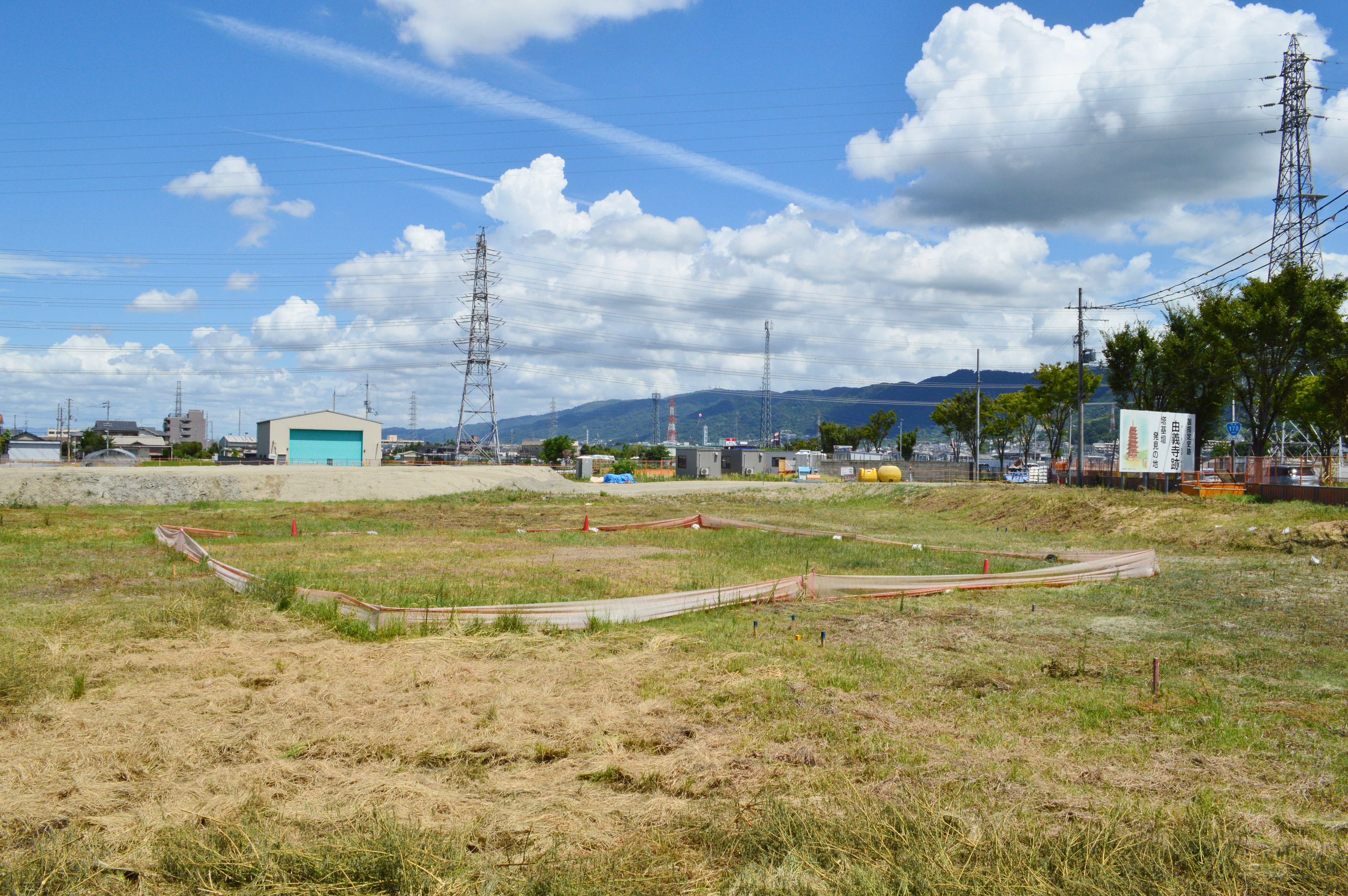 由義寺跡 全景